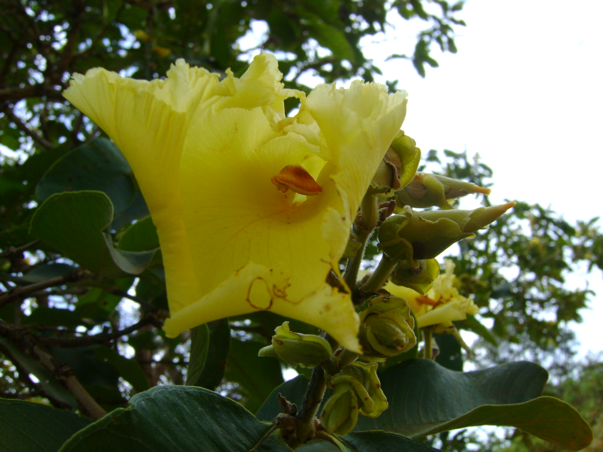 Flor de Pau-Terra-Grande, Qualea grandiflora.